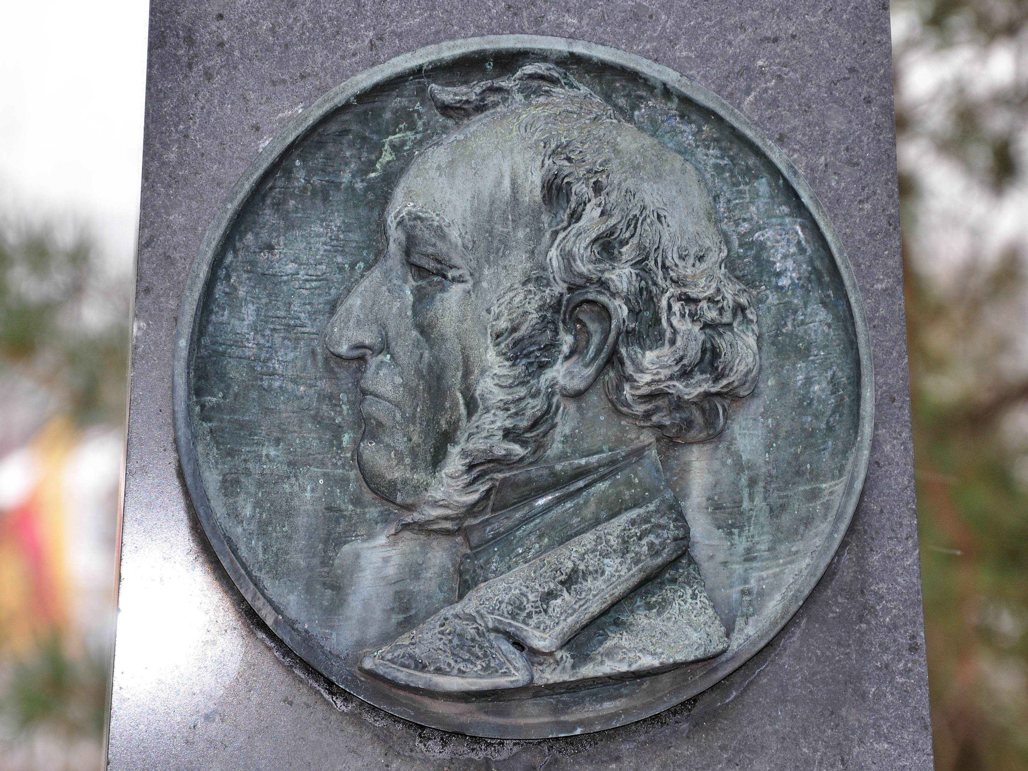 Rüti (1804-1883), Friedhof in Rüti (Switzerland)